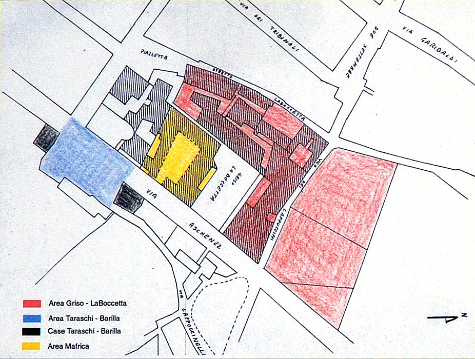 Reggio Calabria:Planimetria alla fine del XIX secolo dell'area archeologica Griso-Laboccetta